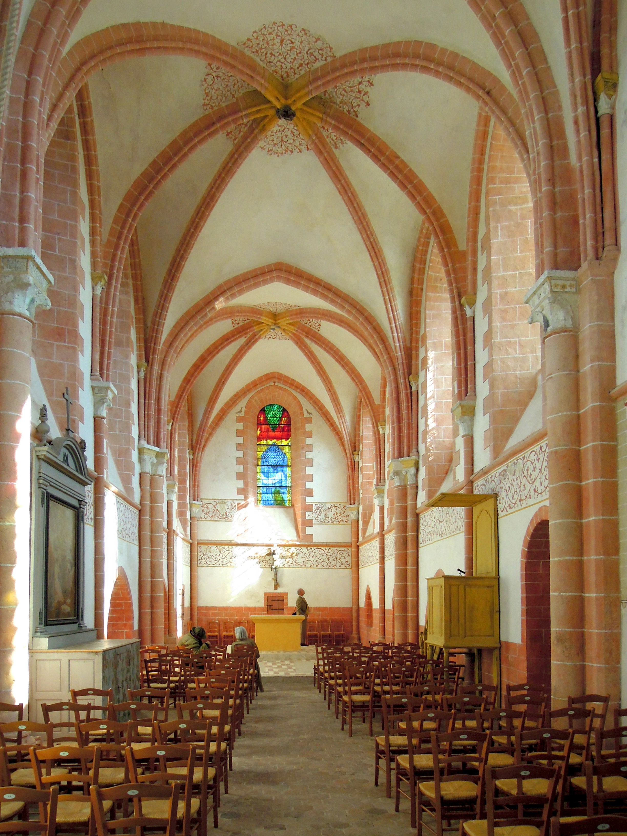 Lourps (commune de Longueville, Seine-et-Marne), église Saint-Menge, vue intérieure.